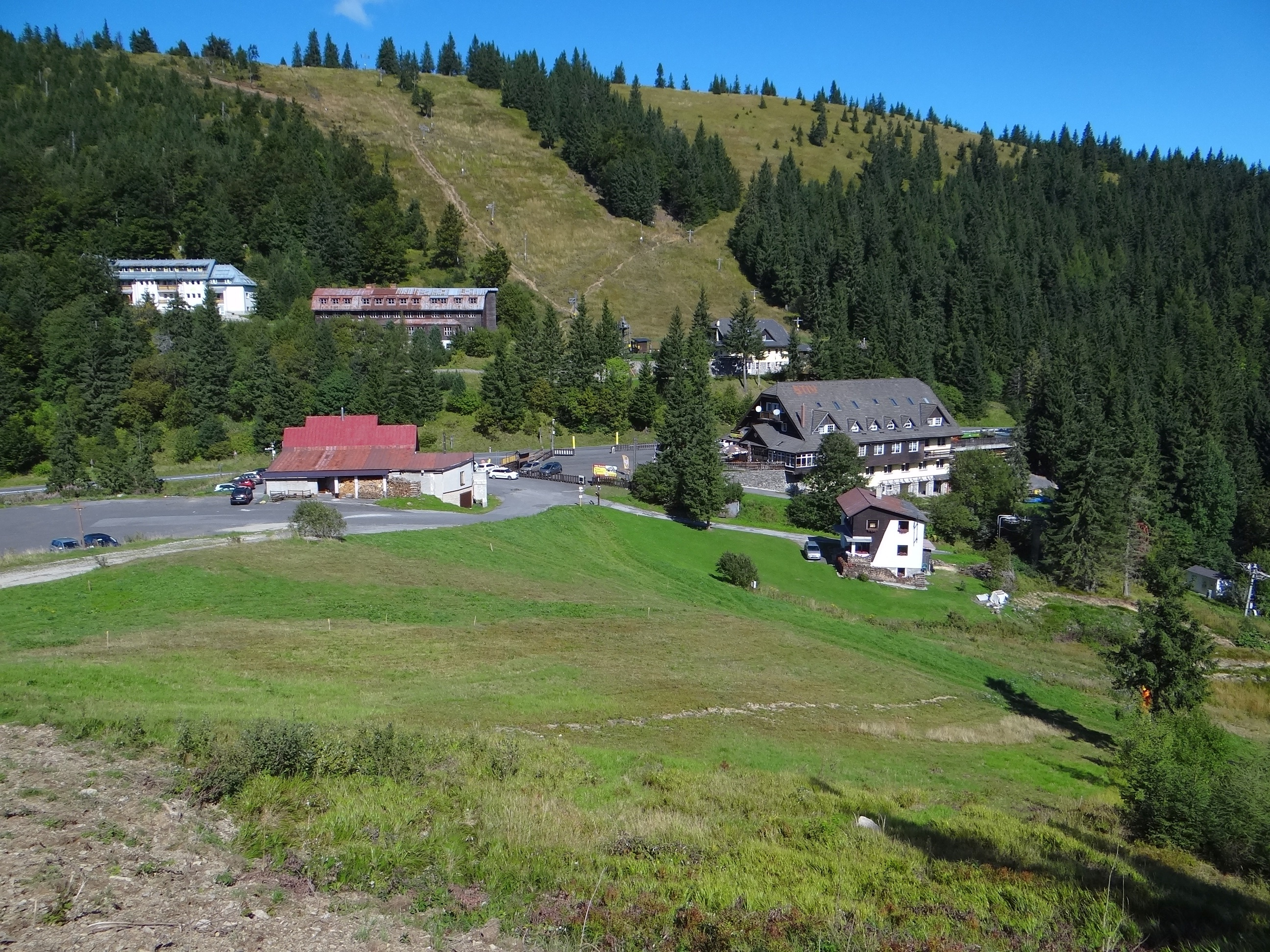 Čertovica, sedlo